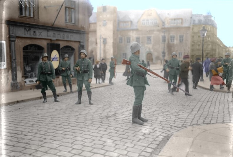 This is a retouched picture, which means that it has been digitally altered from its original version. Modifications: recolored by User:Eclipse.sx. Recolored Version of File:Bundesarchiv_Bild_102-00189,_Sachsen,_Vorgehen_der_Reichswehr_gegen_Kommunisten.jpg Original description: Title: Sachsen, Vorgehen der Reichswehr gegen Kommunisten Additional information: Richtigstellung: Es handelt sich um Freiberg in Sachsen, vgl. [File:Freiberg Obermarkt Rathaus.jpg] Factual corrections and alternative descriptions are encouraged separately from the original description. Additionally errors can be reported at this page to inform the Bundesarchiv. Original historic description: Vorgehen der Reichswehr gegen die kommunistischen Hundertschaften in Sachsen. Abriegeln einer Strasse durch Reichswehr mit gefälltem Bajonett in Freiberg in Sachsen.